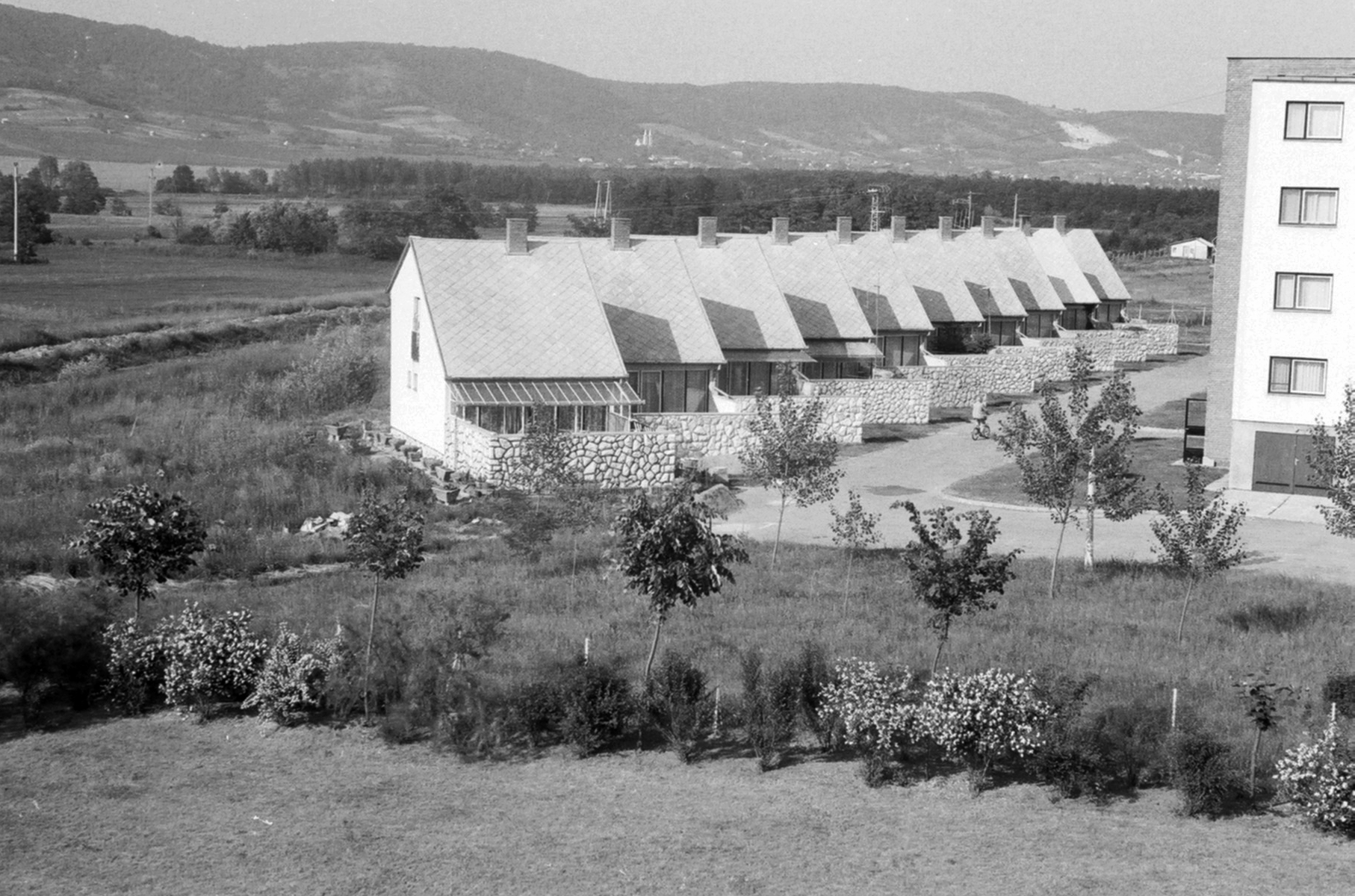 kilátás Máriagyűd irányába. Location: Hungary, Harkány, Bartók Béla utca. Az üdülőházak mögött lévő sorházak, kapuval le van zárva. Title: kilátás Máriagyűd irányába.